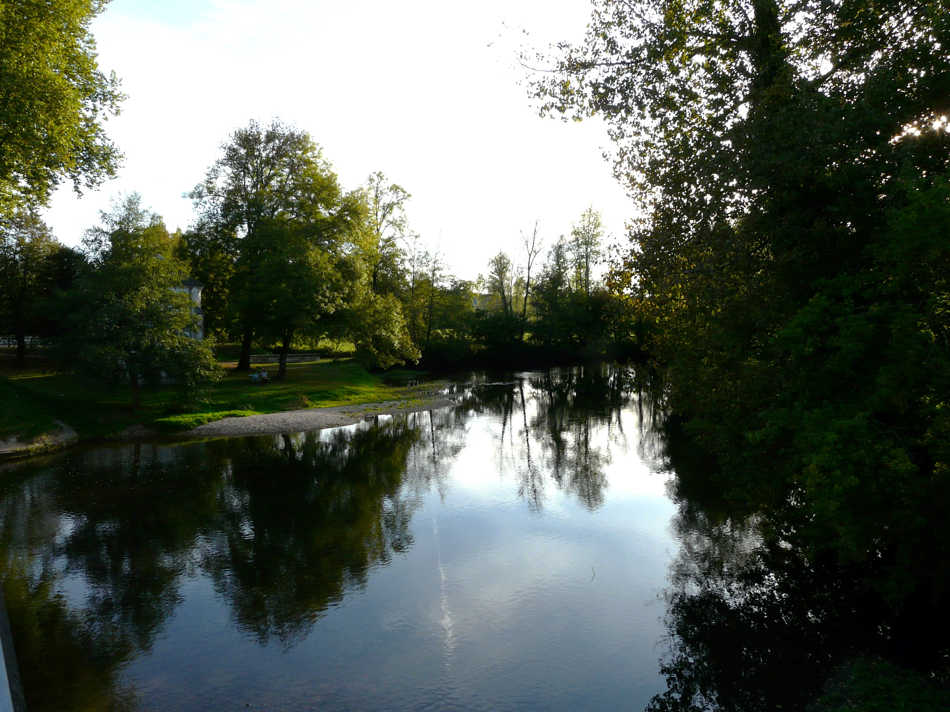 La Dronne au Moulin du Pont, entre Tocane-Saint-Apre (à gauche) et Montagrier, Dordogne, France. Vue vers l'aval. Le bâtiment qu'on aperçoit dans les arbres est la chapelle Notre-Dame de Perdux.